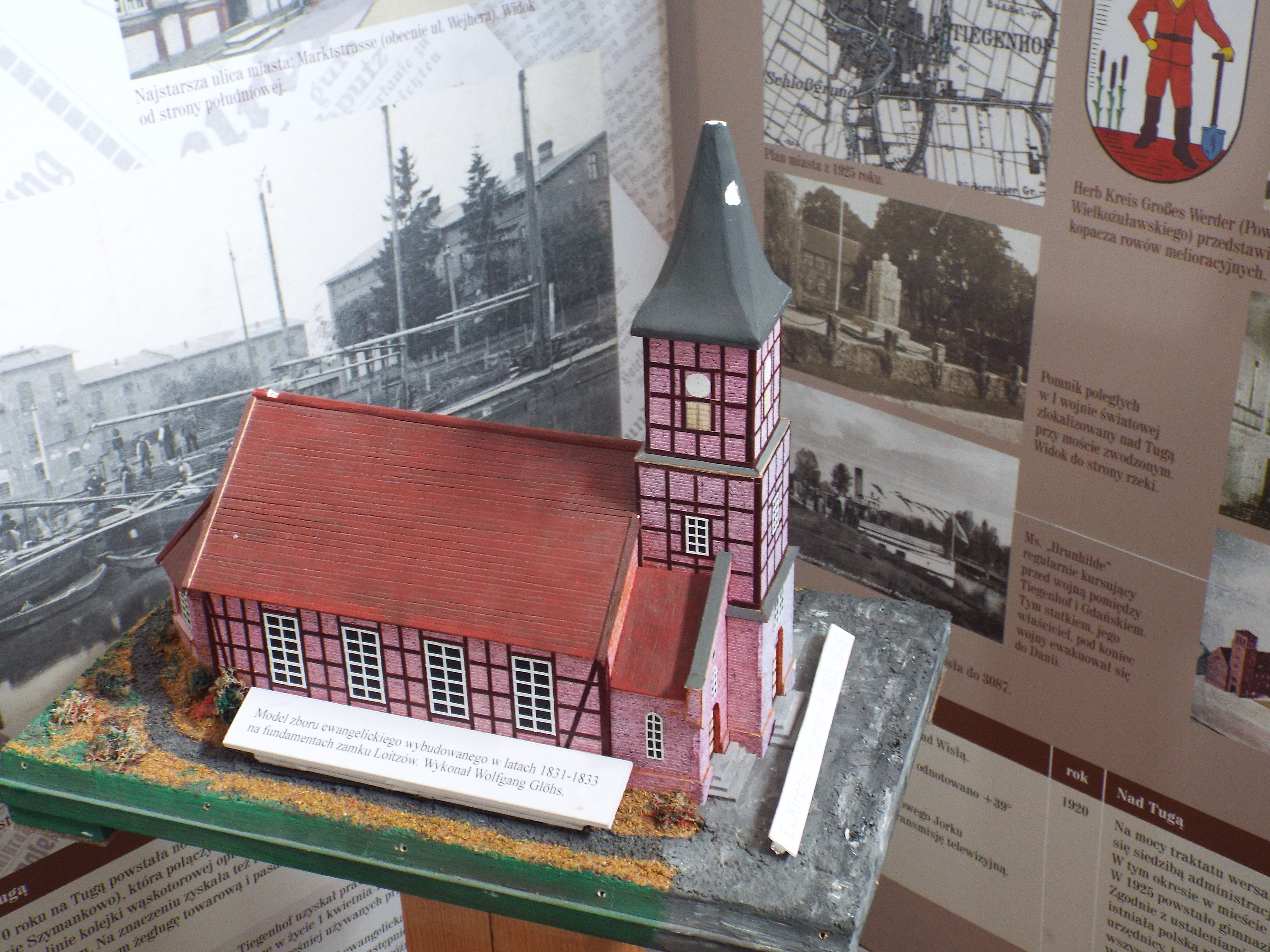 Лютеранський костел в Новому Дворі Гданському. макет. При костелі вникла православна парфія, яка мала полонізувати переселених українців . Не зберігся. залишився лише будинок парафії по вул. Б. Хороброго, 6. Фото Івана Парнікози, 2019 р.